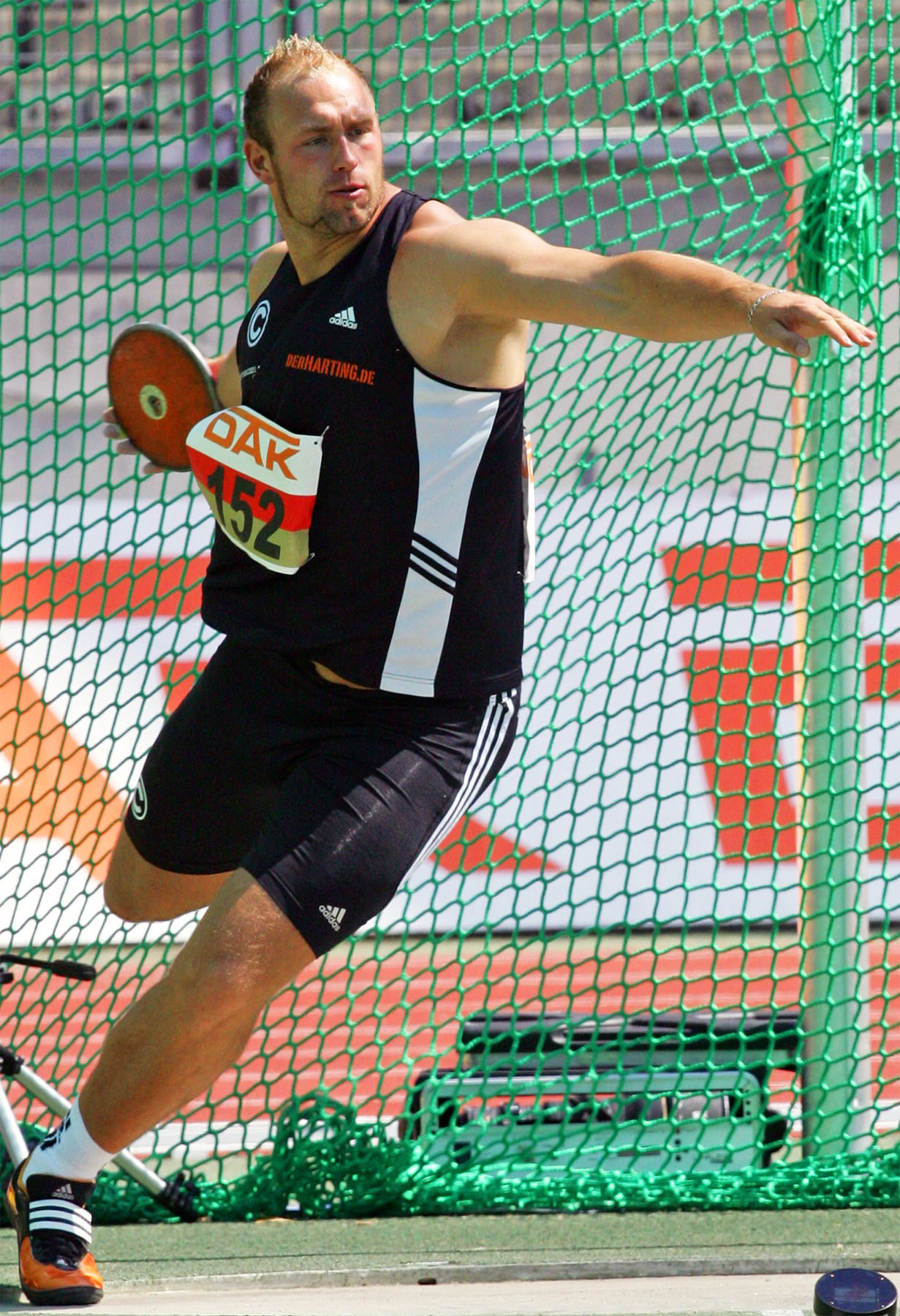 Hauptgefreiter Robert Harting von der Sportfördergruppe Potsdam beim Diskuswerfen. ©Bundeswehr/Rott